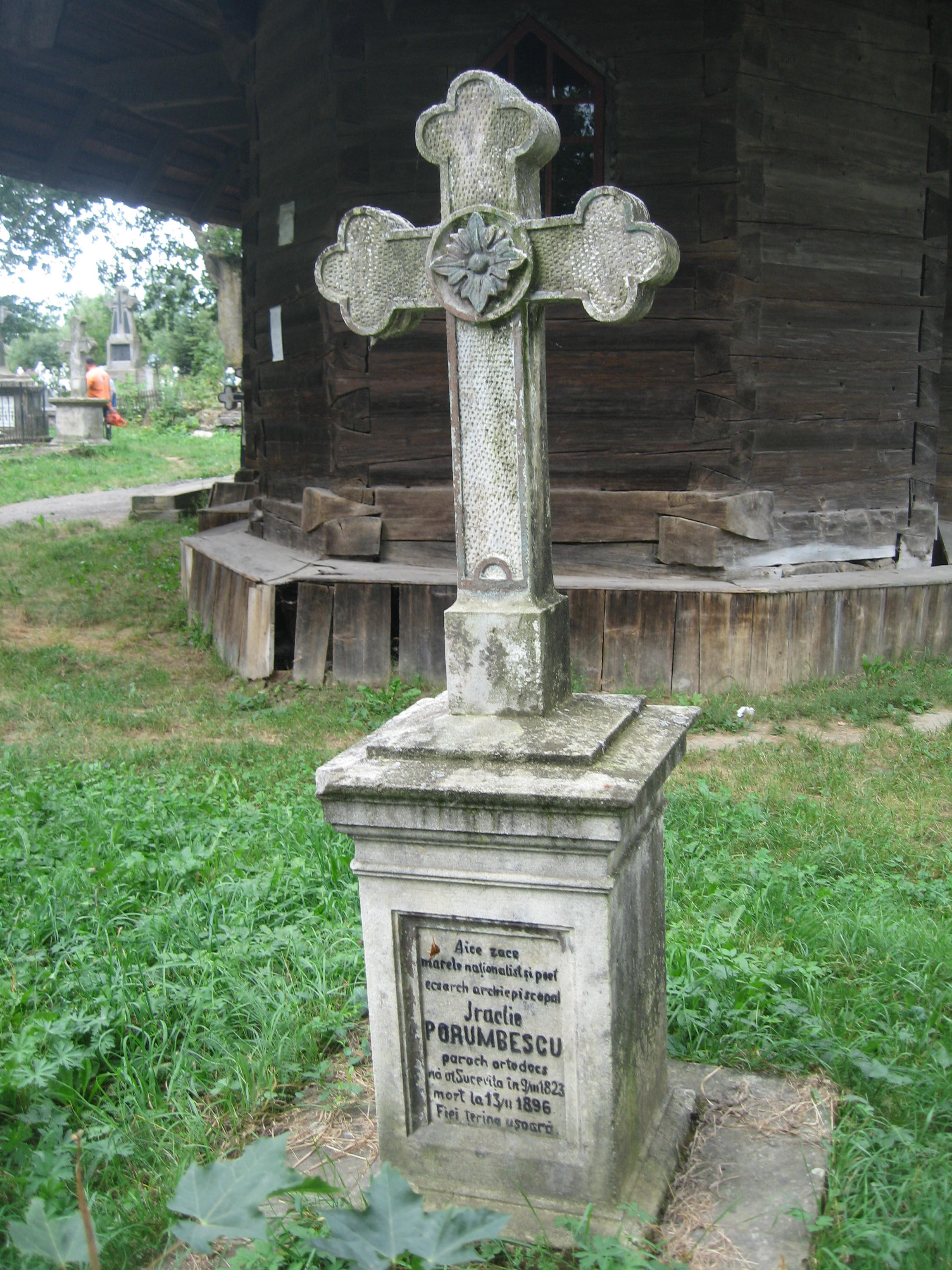 Biserica de lemn din Frătăuţii Noi